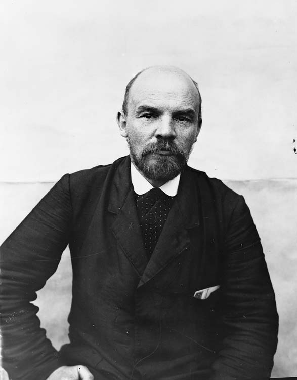 В.И.Ленин. Портрет. 1914 г., между 6 (19) и 13 (26) августа. Поронин, Польша. Негатив-оригинал (стекло). 10 х 15 см. Фотограф: Б.Д. Вигилев